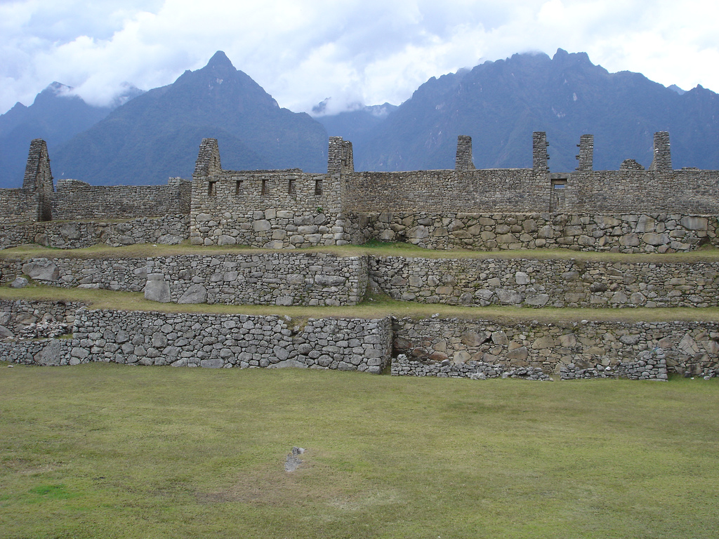 Machu Picchu, Peru.